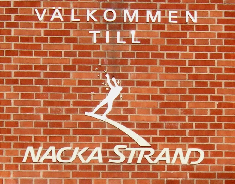 Skylt i Nacka Strand, Nacka.